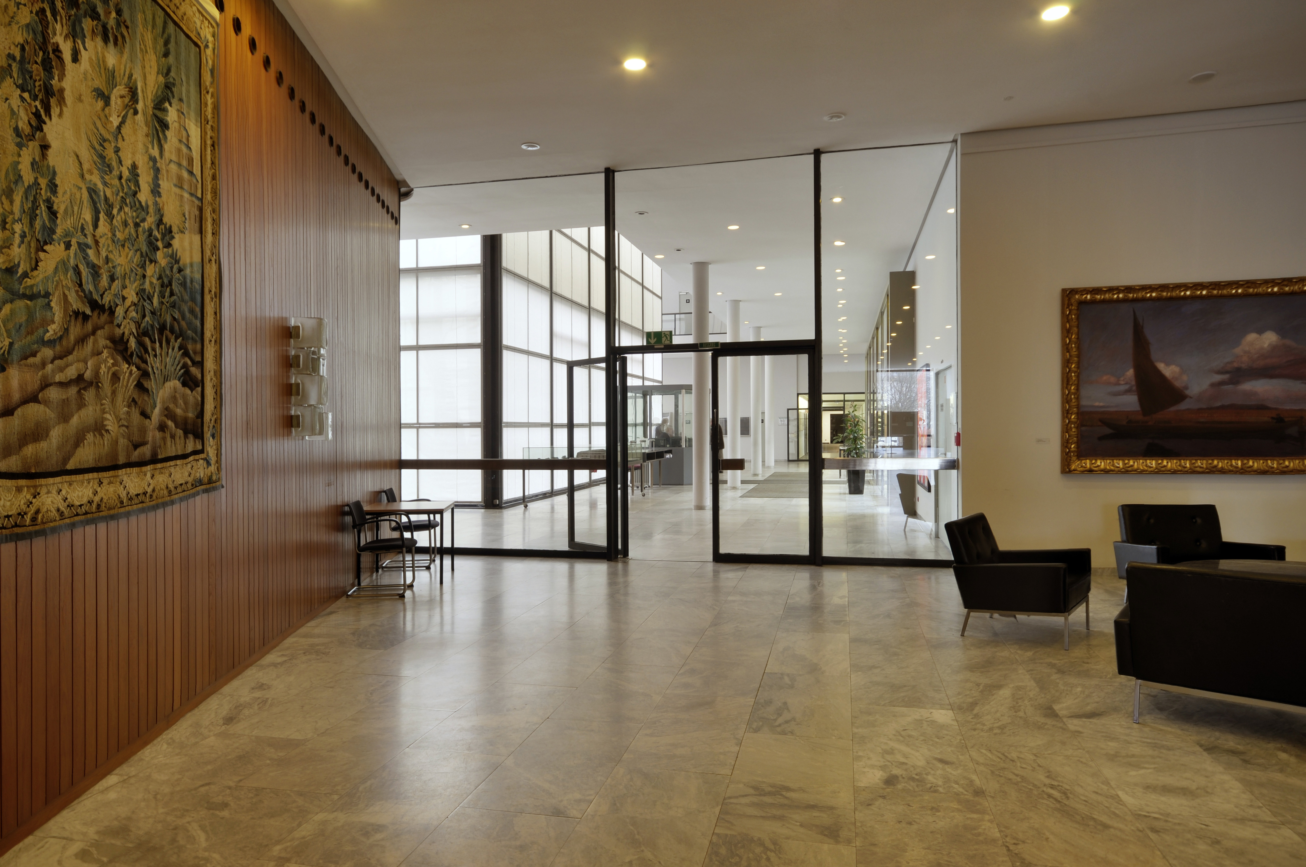 Landtag Niedersachsen, Hannover Wikipedia im Landtag – Niedersachsen 19. März 2013 in HannoverDieses Bild entstand während eines Fototermins im Niedersächsischen Landtagsgebäude in Hannover vor dem geplanten Abriß und Neubau bis 2017. Die Landtagsverwaltung hat uns gestattet, alle Räume zu dokumentieren.